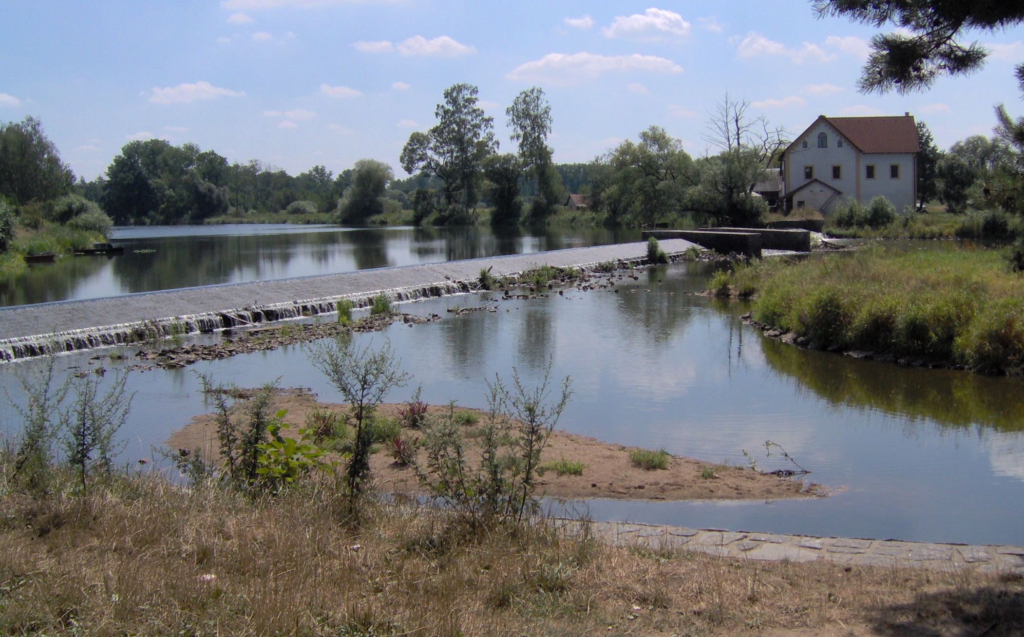 Lužnice,jez v Soběslavi (Steiniger) při malé vodě v červenci 2007